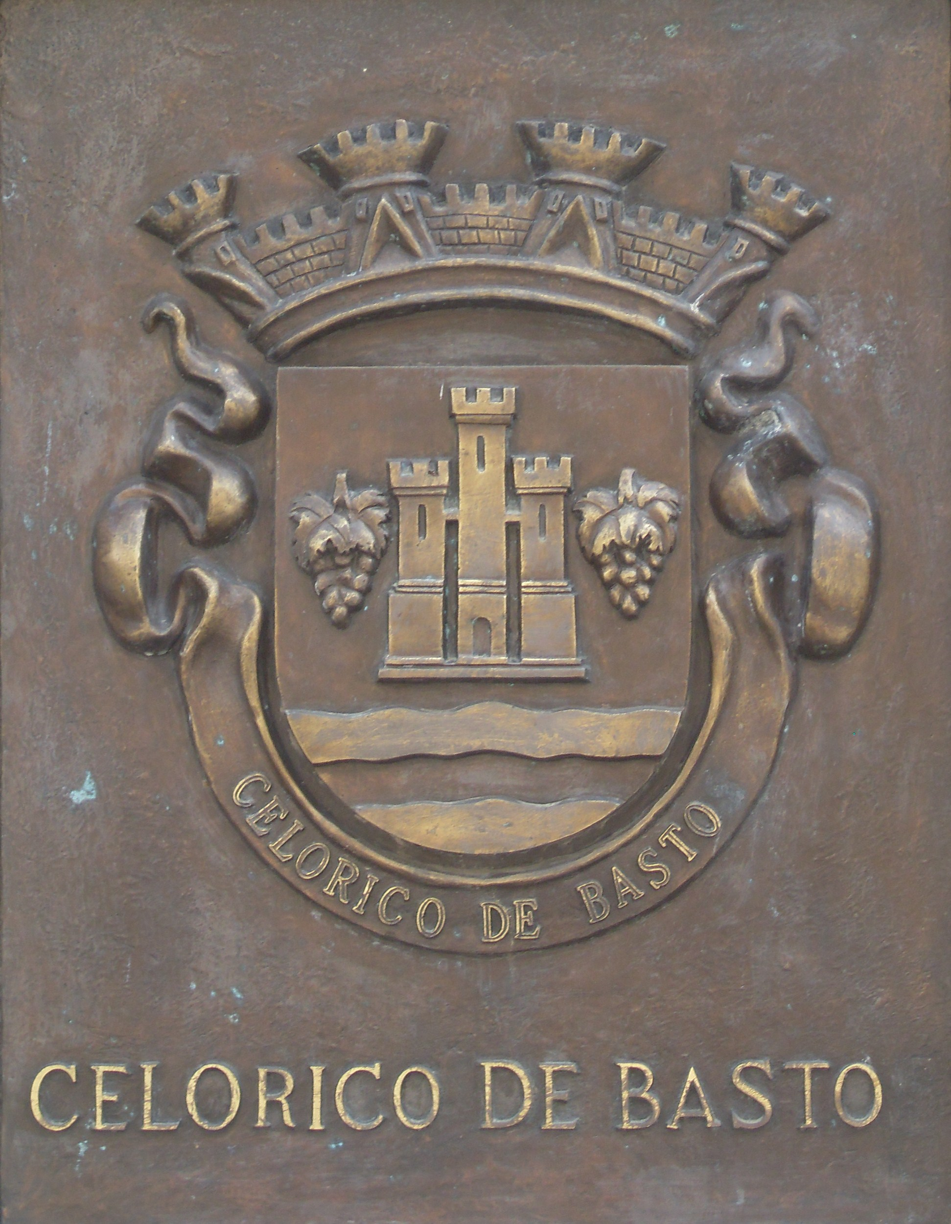 Brasões dos Bispos do distrito de Braga, Esses brasões são parte do Monumento aos Arcebispos de Braga e estão localizados no rossio da Sé de Braga.